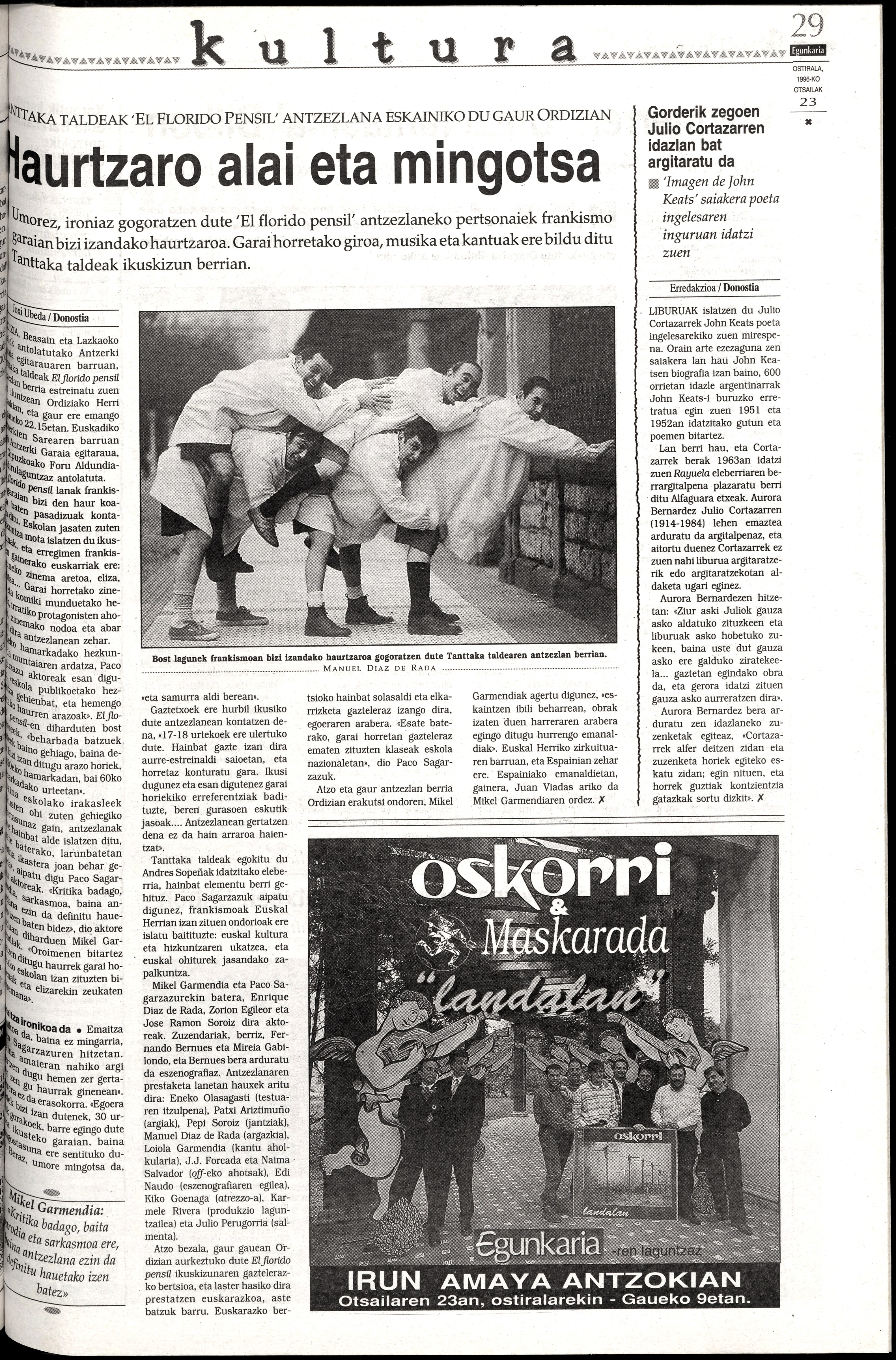 Artikulua Eugunkarian El florido Pensil antzerkilanaz, 1996-02-23